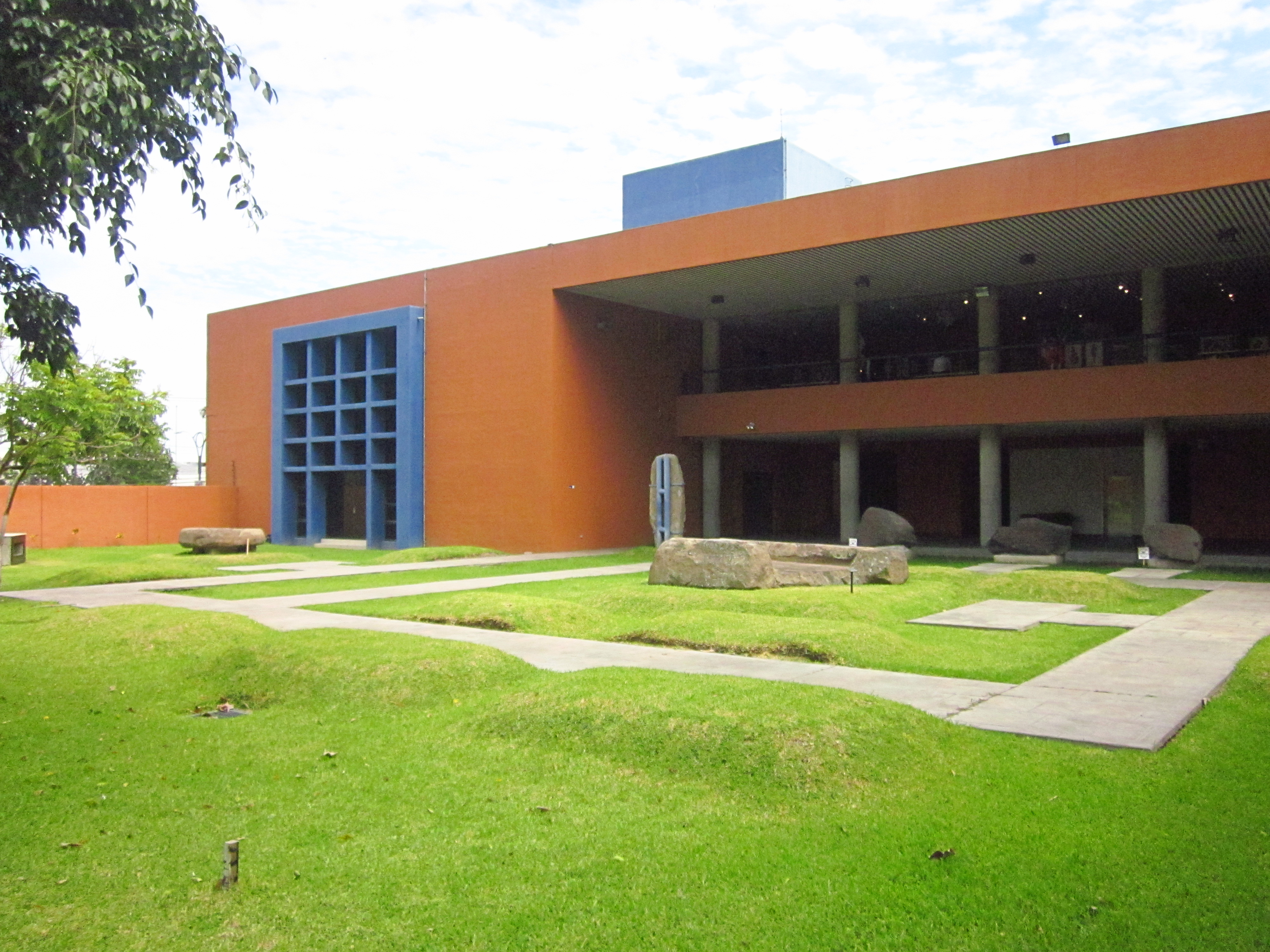 Jardín de piedra, elementos precolombinos en el Museo de Antropología "David J. Guzman"